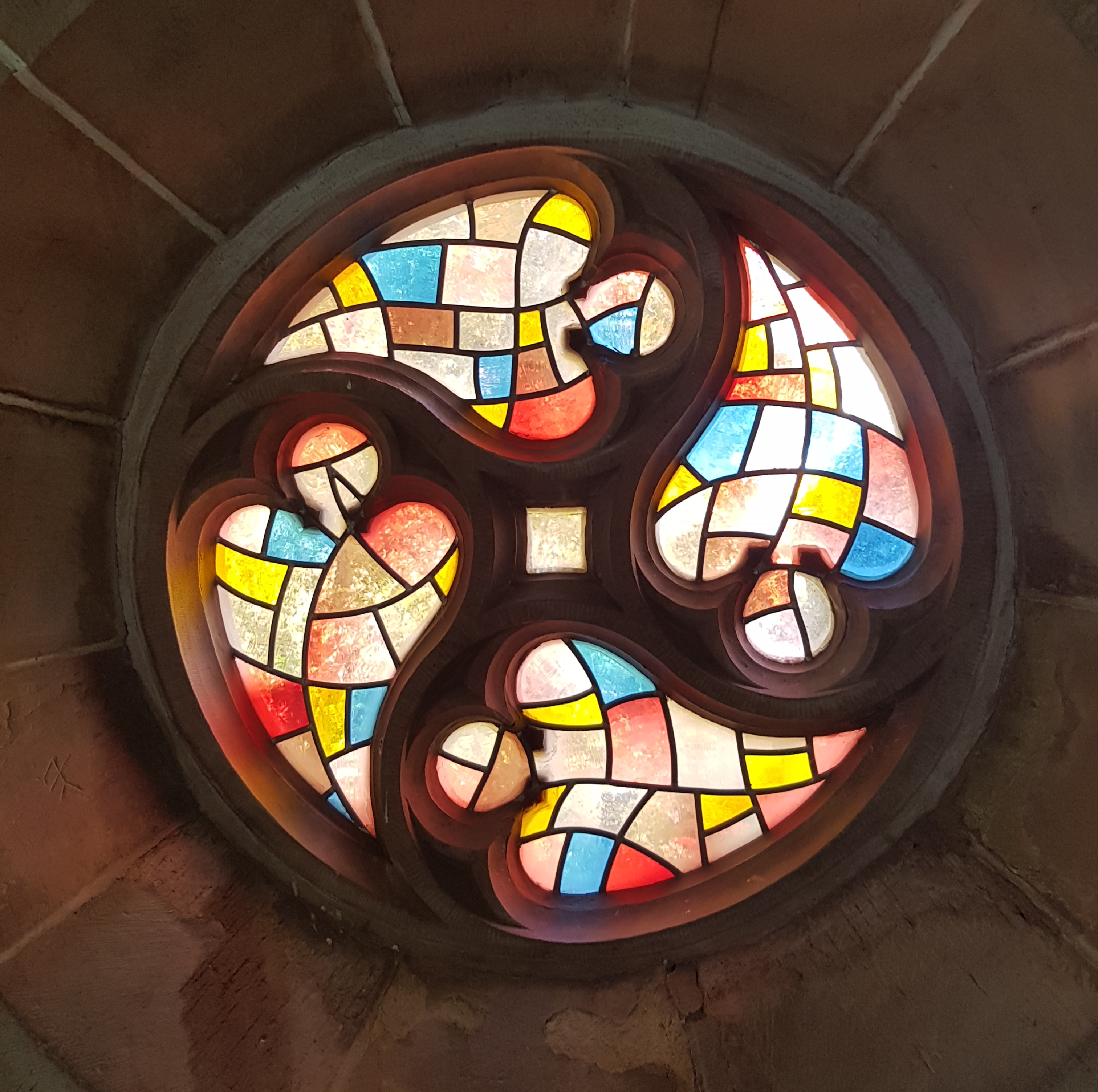 Spätgotische Fensterrosette der Speyrer Kirche in Ditzingen.